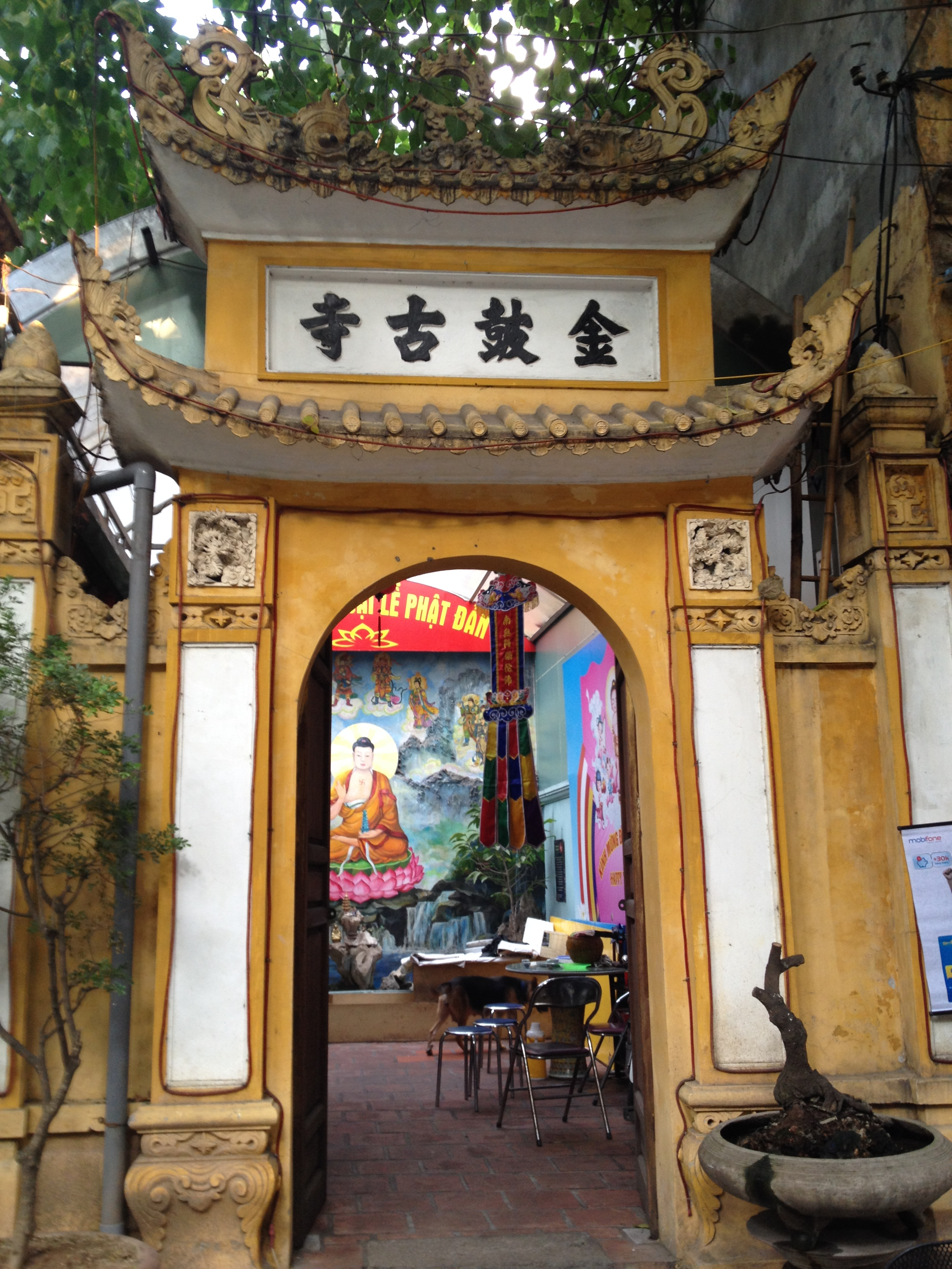 Hà Nội, Việt Nam.